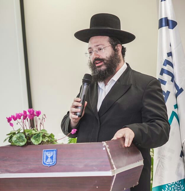 אברהם מנלה